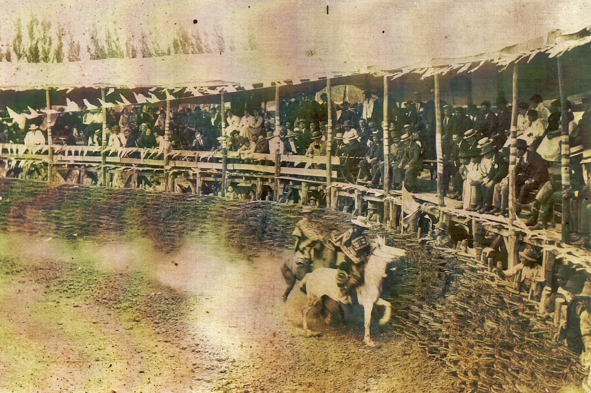 Medialuna